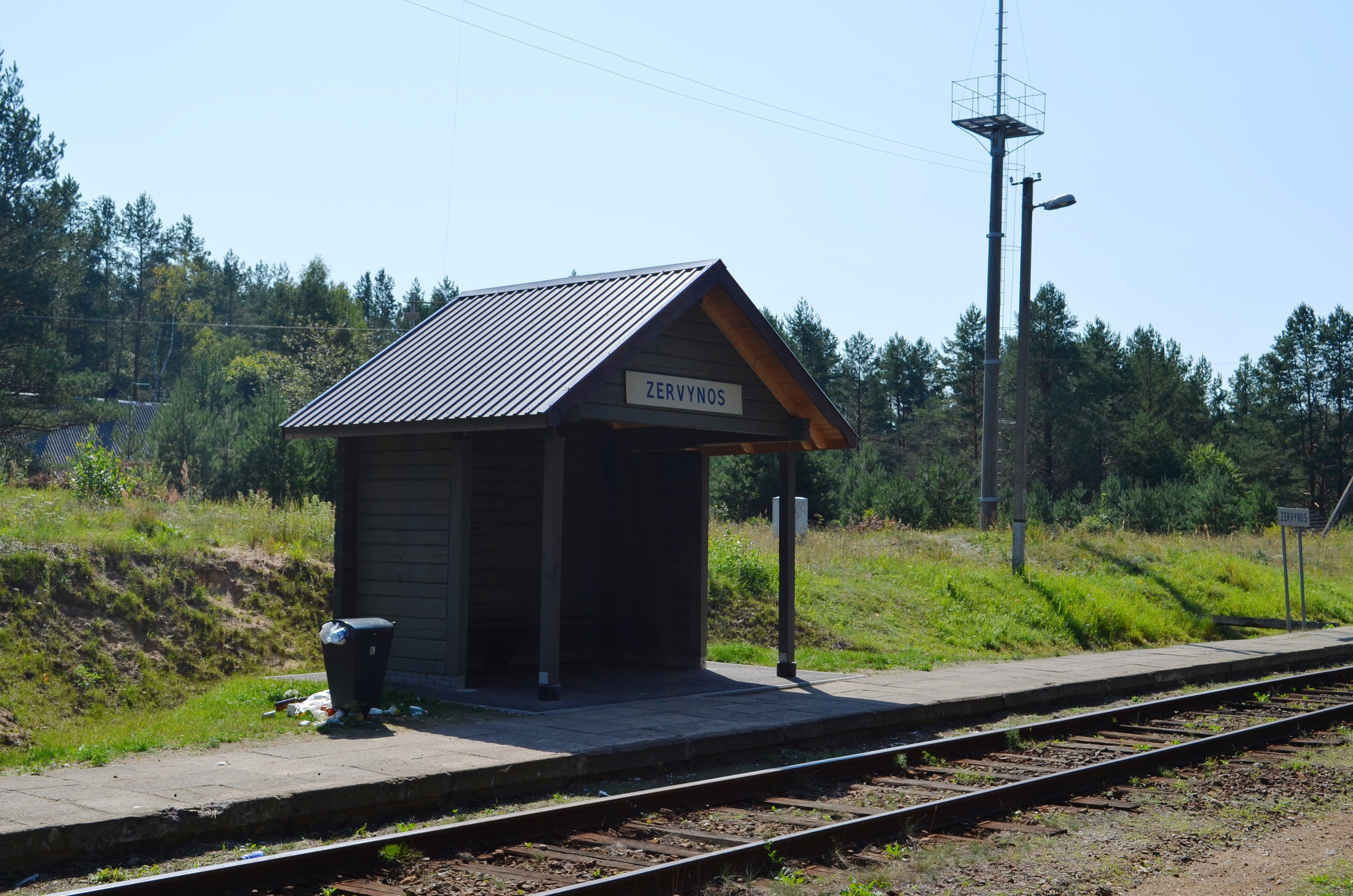 Zervynos, Varėnos raj. Geležinkelio stotelė